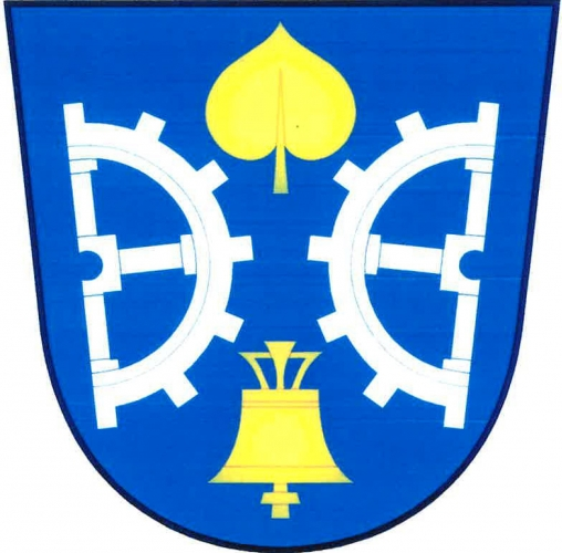 znak, Sedlice, okres Příbram